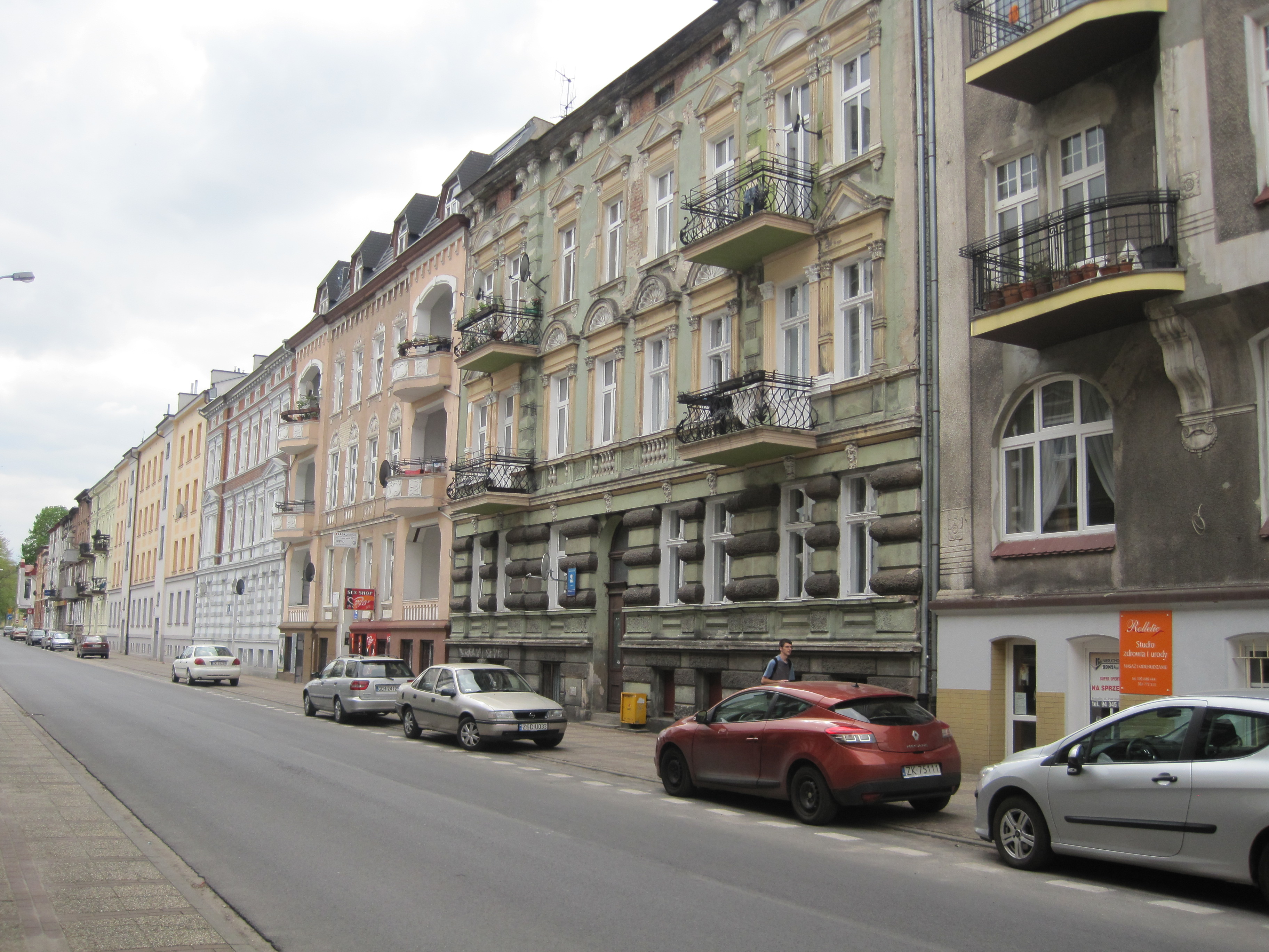 Koszalin ulica Matejki